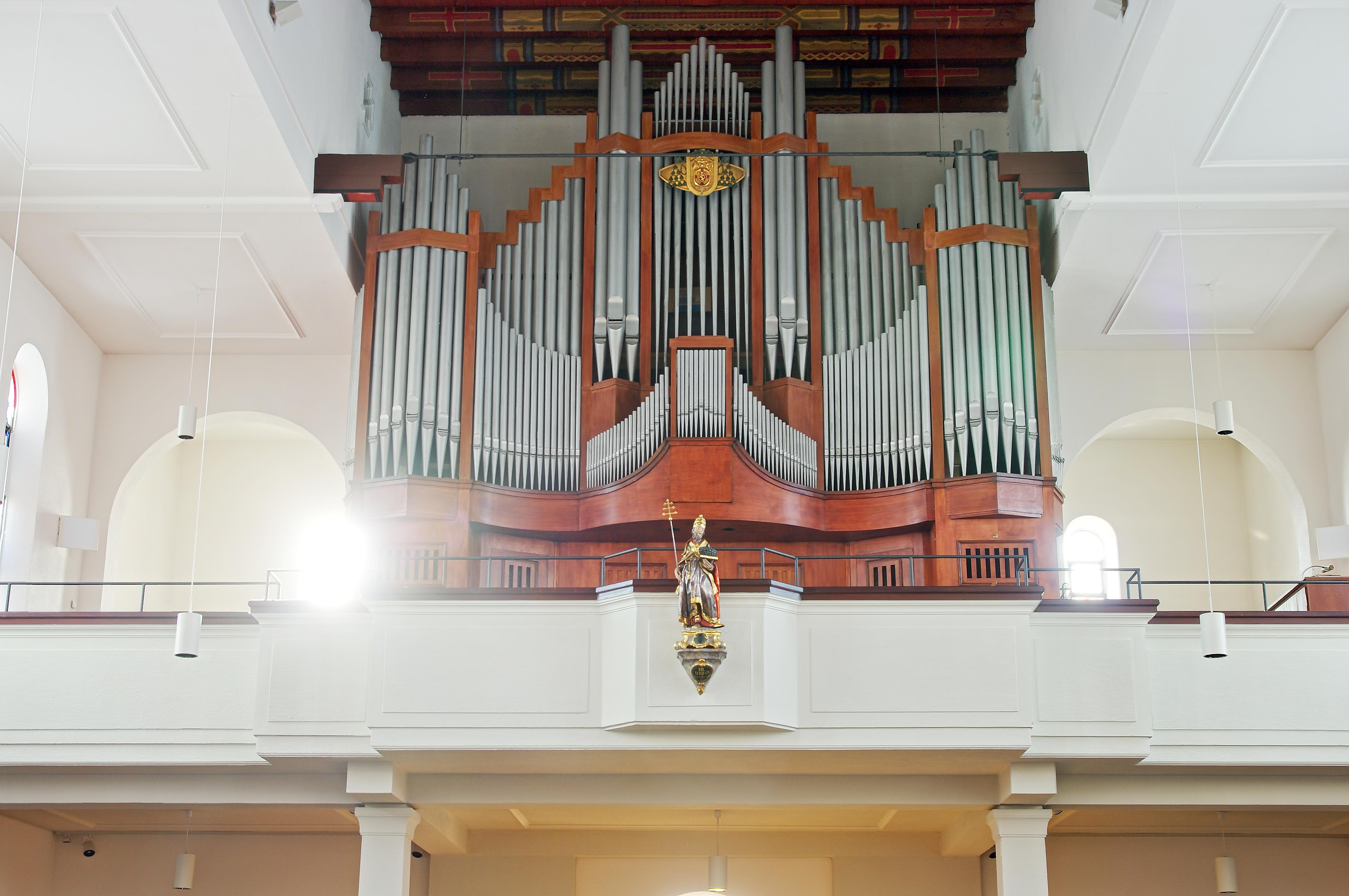 St. Urban